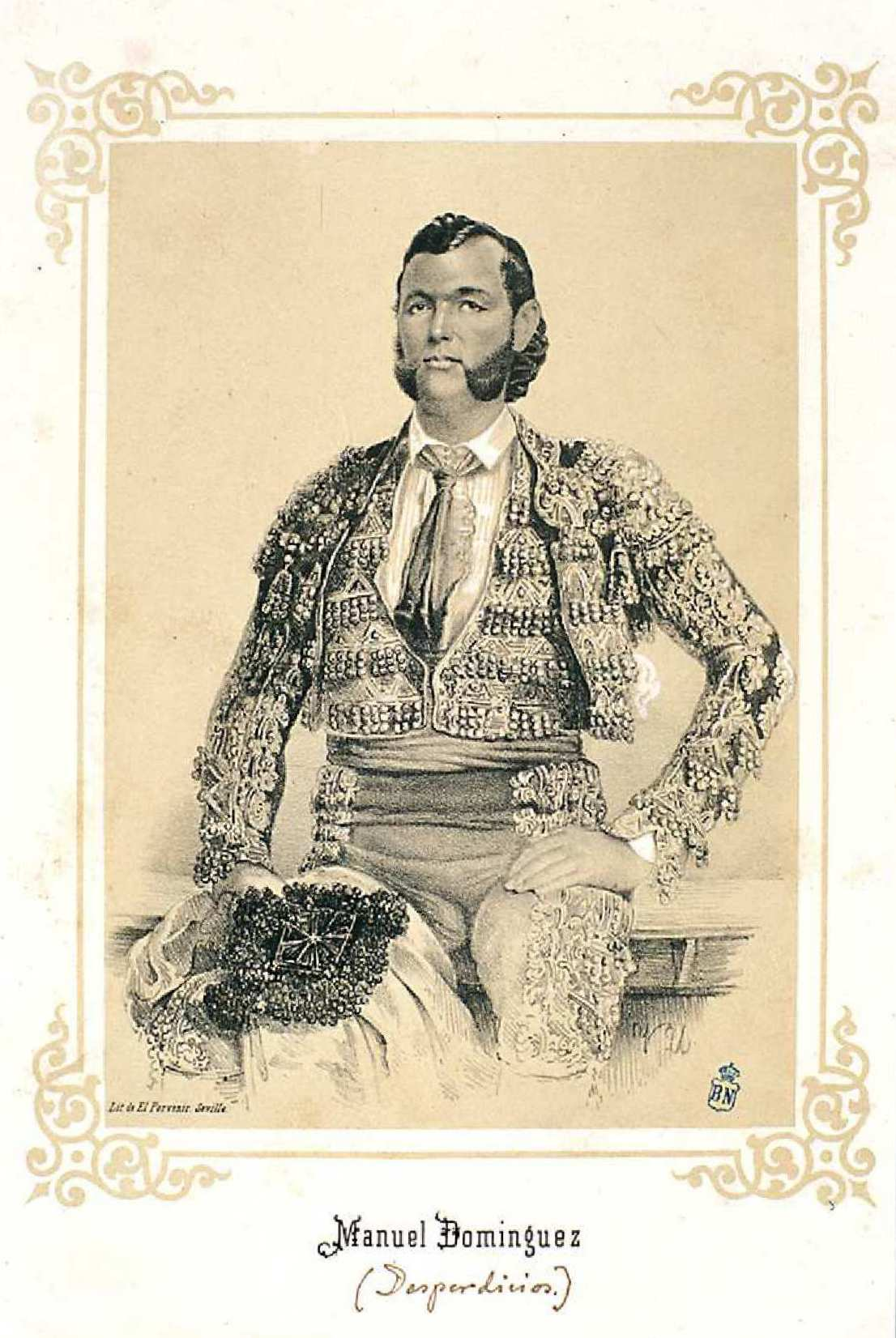 Retrato de Manuel Domínguez (Desperdicios), litografía de Vicente Urrabieta. Biblioteca Nacional de España.